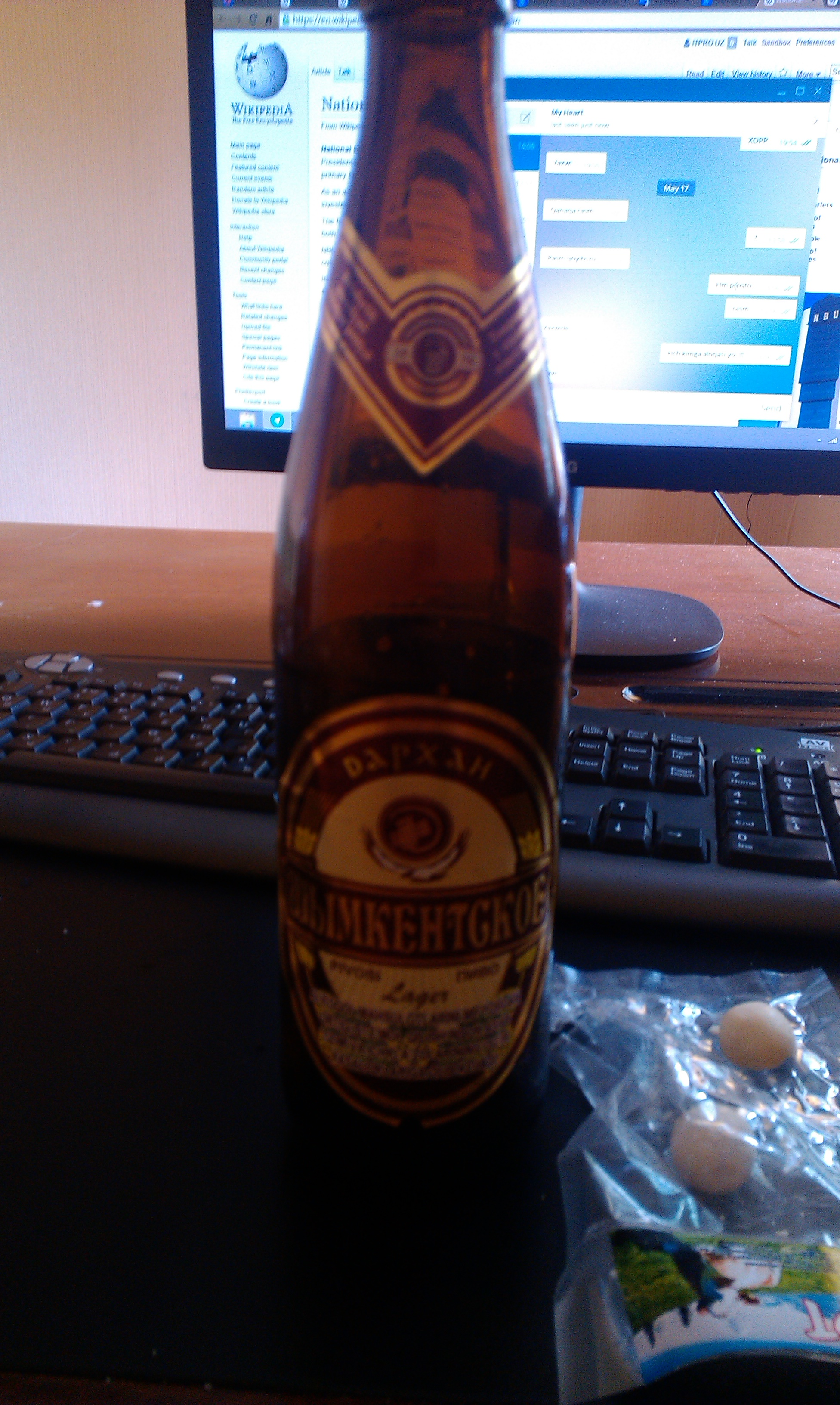 Шымкентпиво